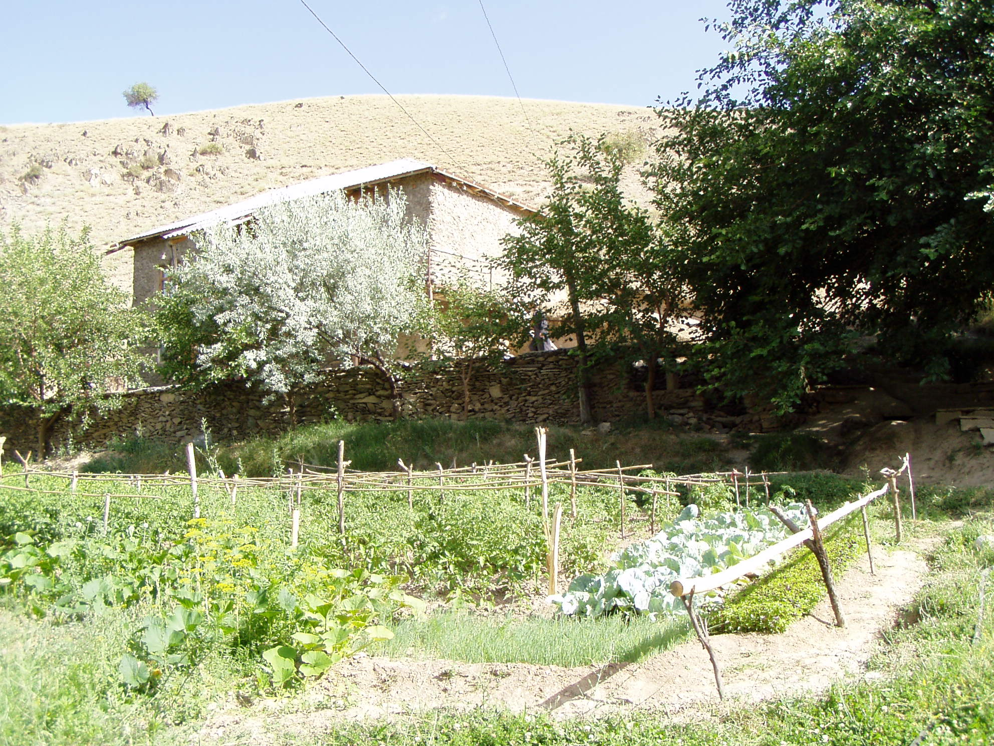 Garden in Hayat Village, Region Dshizak (Uzbekistan)